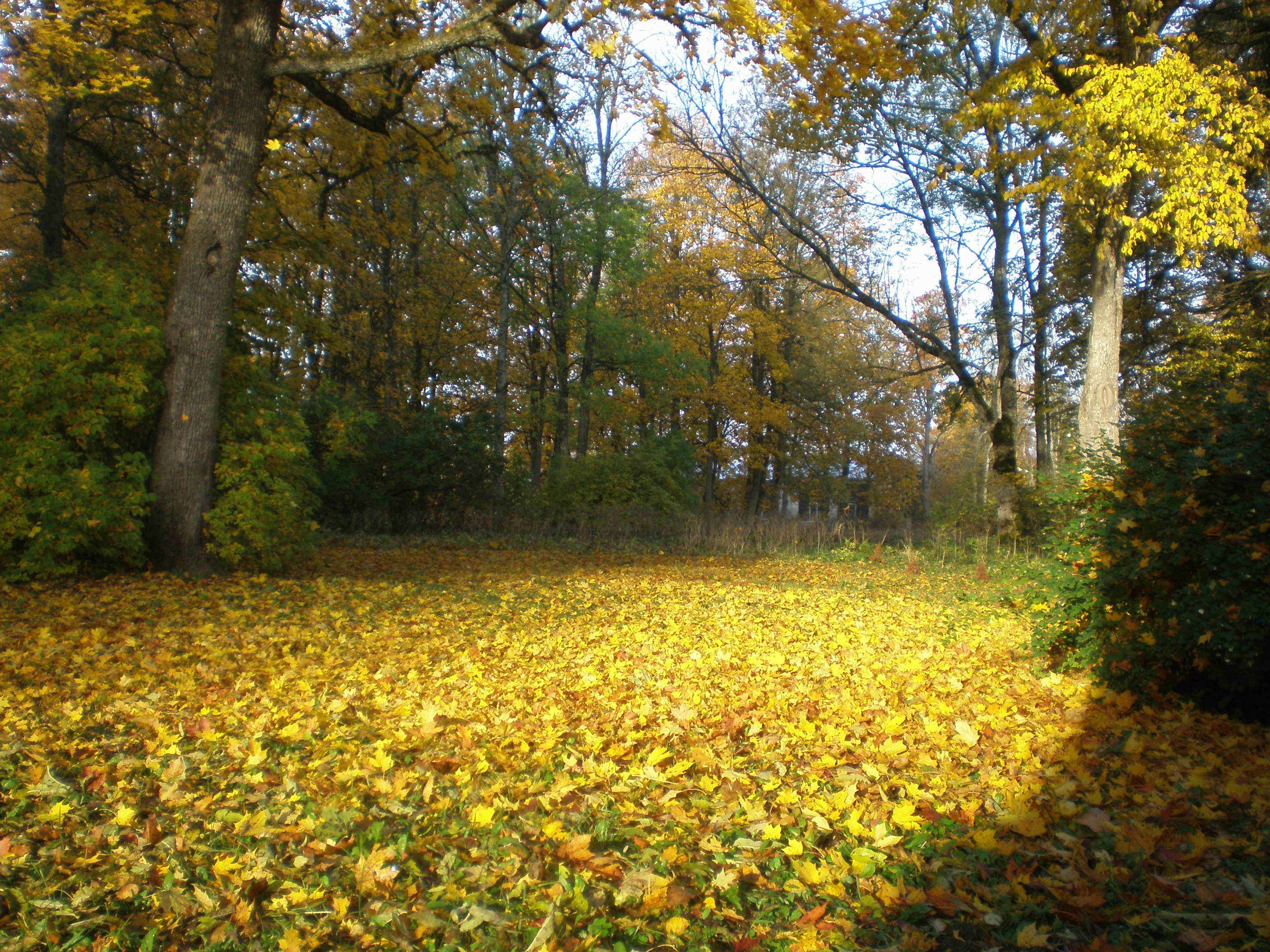 Jootme mõisa park